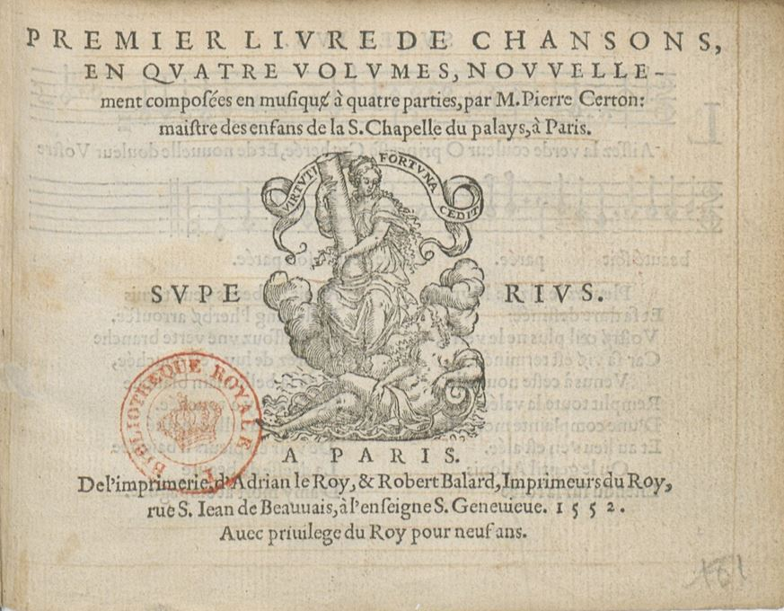 Title page of Pierre Certon, Premier livre de chansons (Paris : Le Roy & Ballard, 1552).